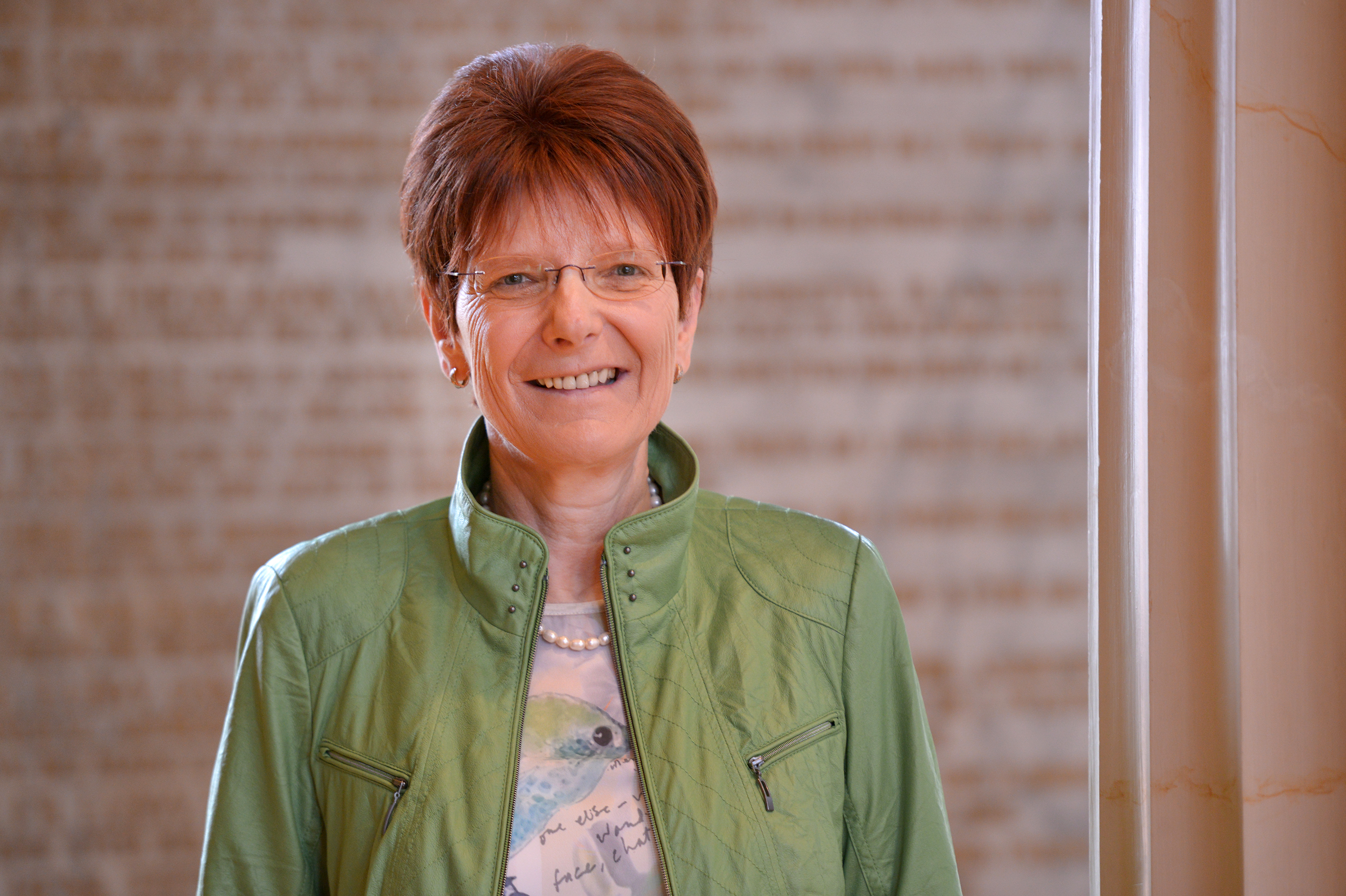 Prof. Dr. Hiltraud Casper-Hehne, Vizepräsidentin der Universität Göttingen, Göttingen, Deutschland